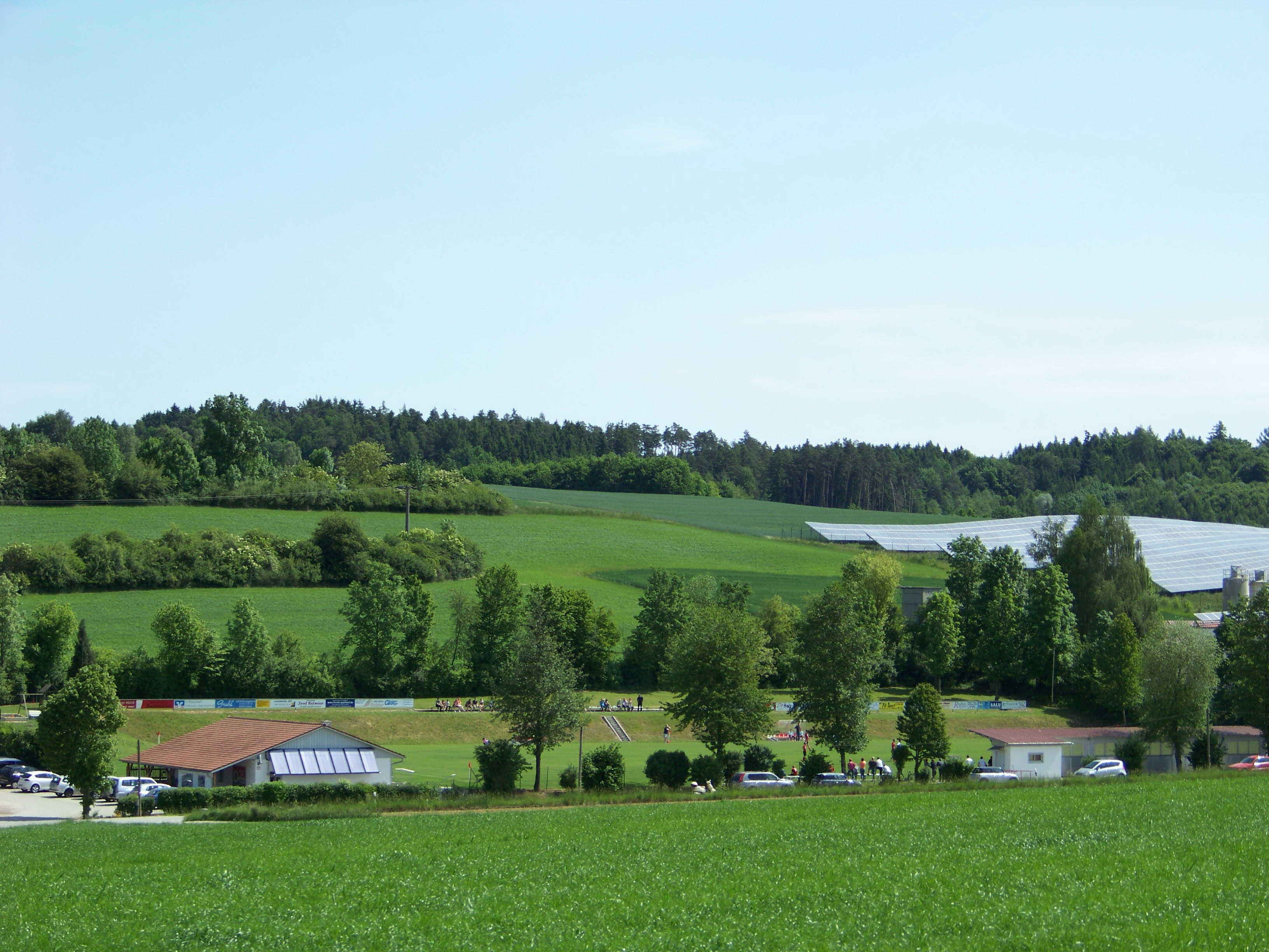 Laberweinting, Hofkirchen. Das Sportgelände am Fuße der Weinleite am Ellenbach. Sportheim, Fußballplatz, Spielplatz und Stockbahnen. Die Felder der Weinleite sind terassenförmig angelegt und durch Hecken gegliedert.